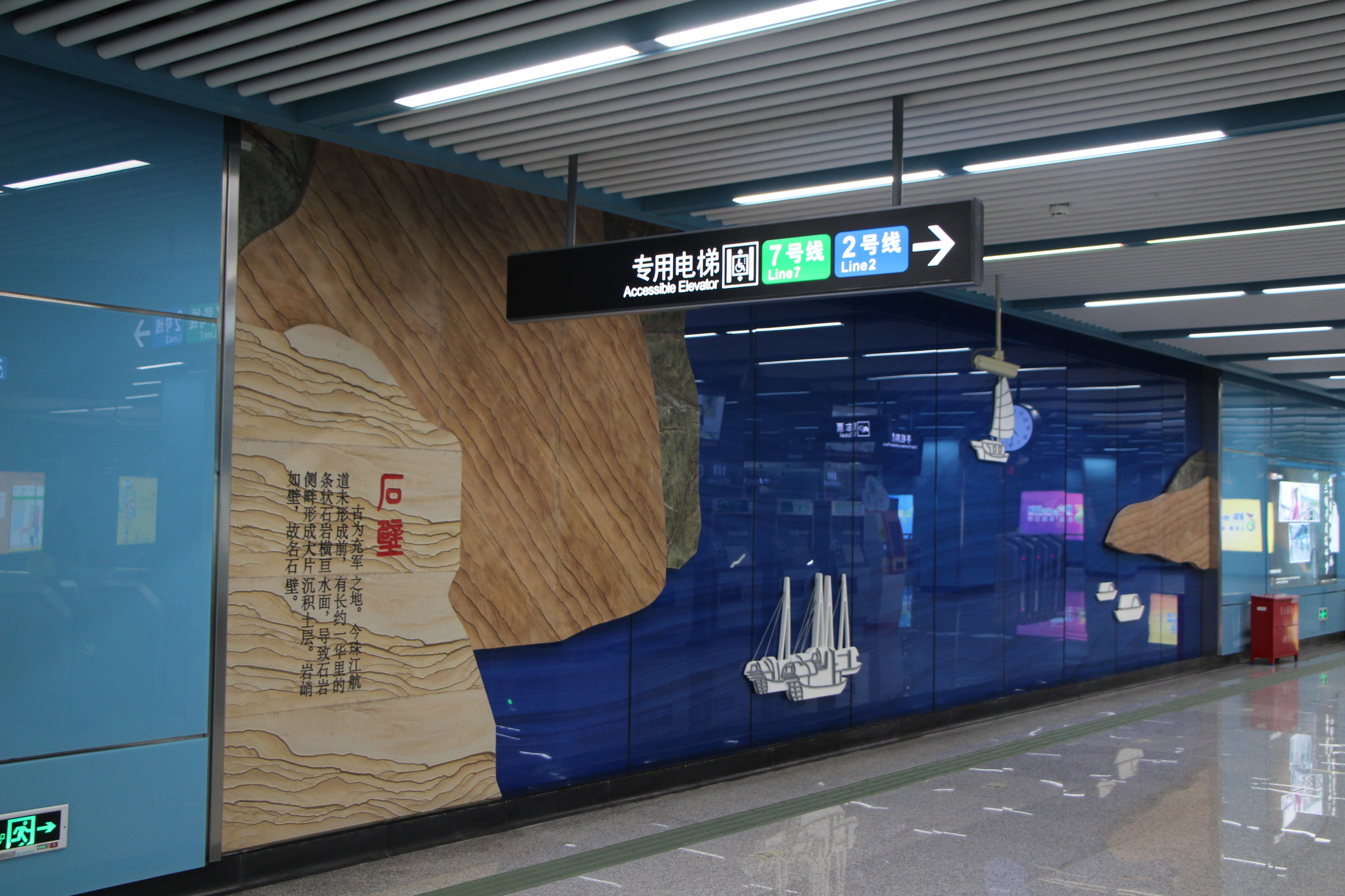 广州地铁石壁站